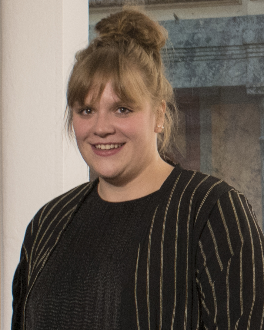 Novinářská konference 9.12.2019. Autor: Blanka Borová (Karolína Černá) pro Kritiky.cz